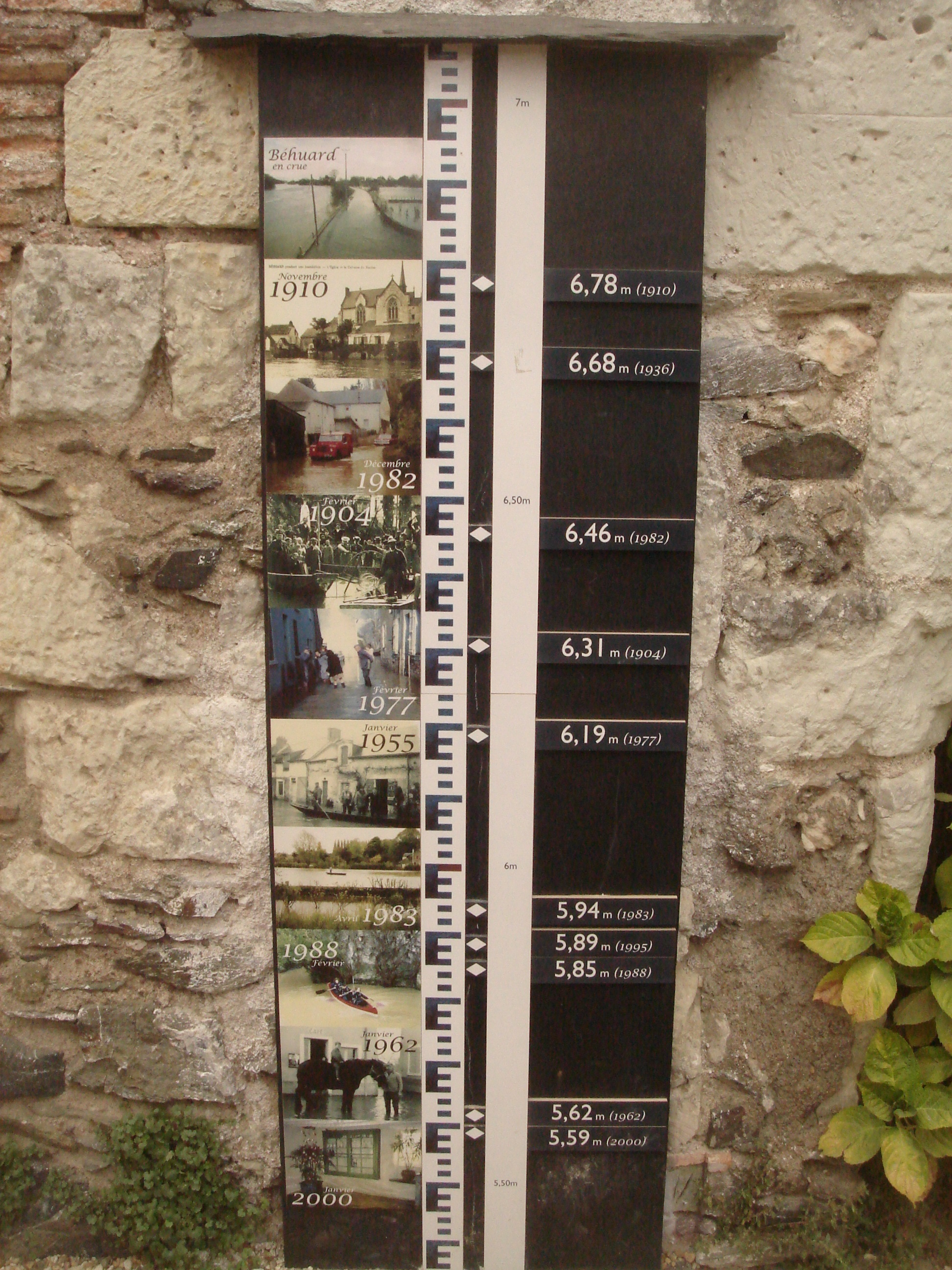 échelle de crue, Behuard, Maine-et-Loire, Pays de la Loire, France